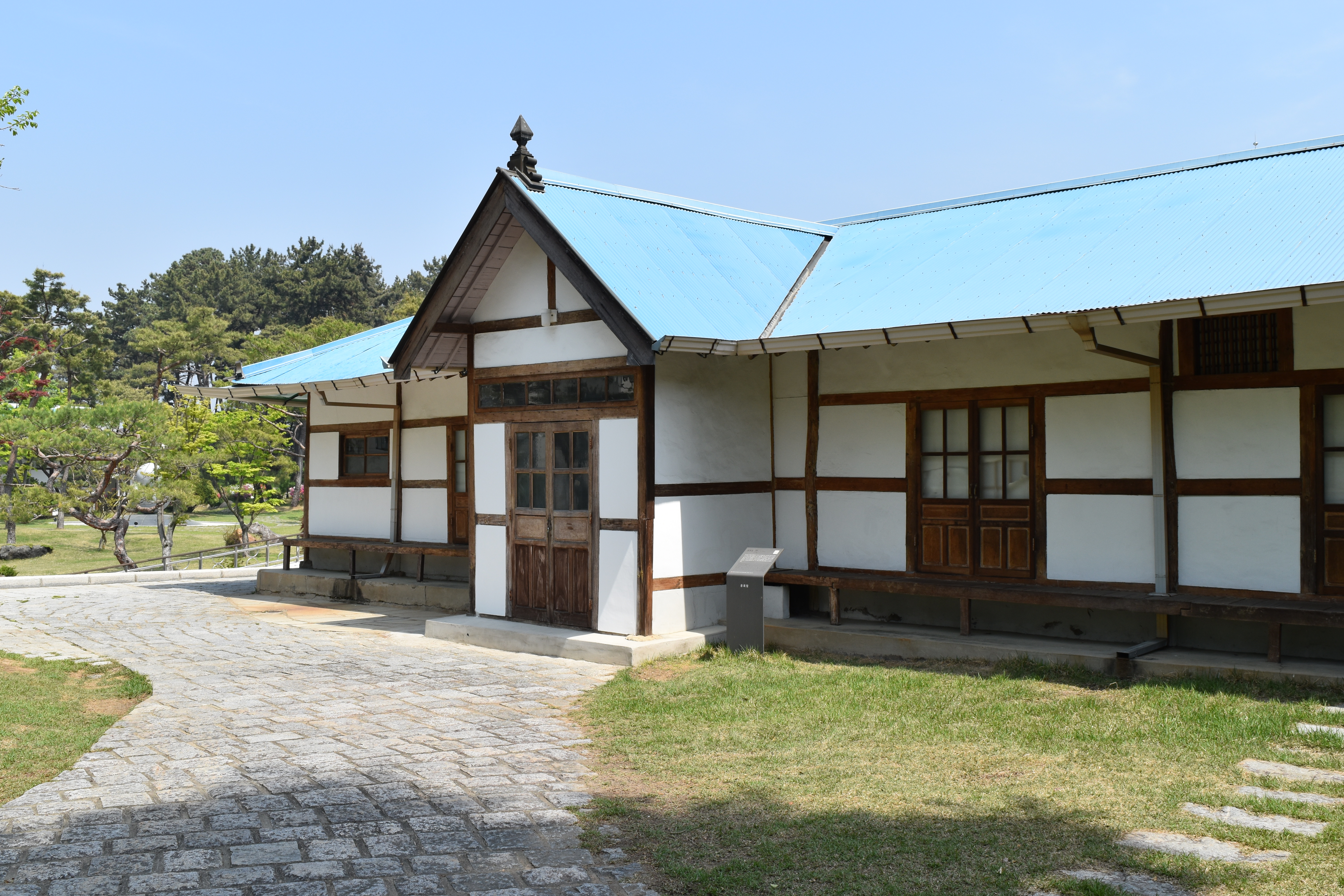 원불교 익산 성지 공회당